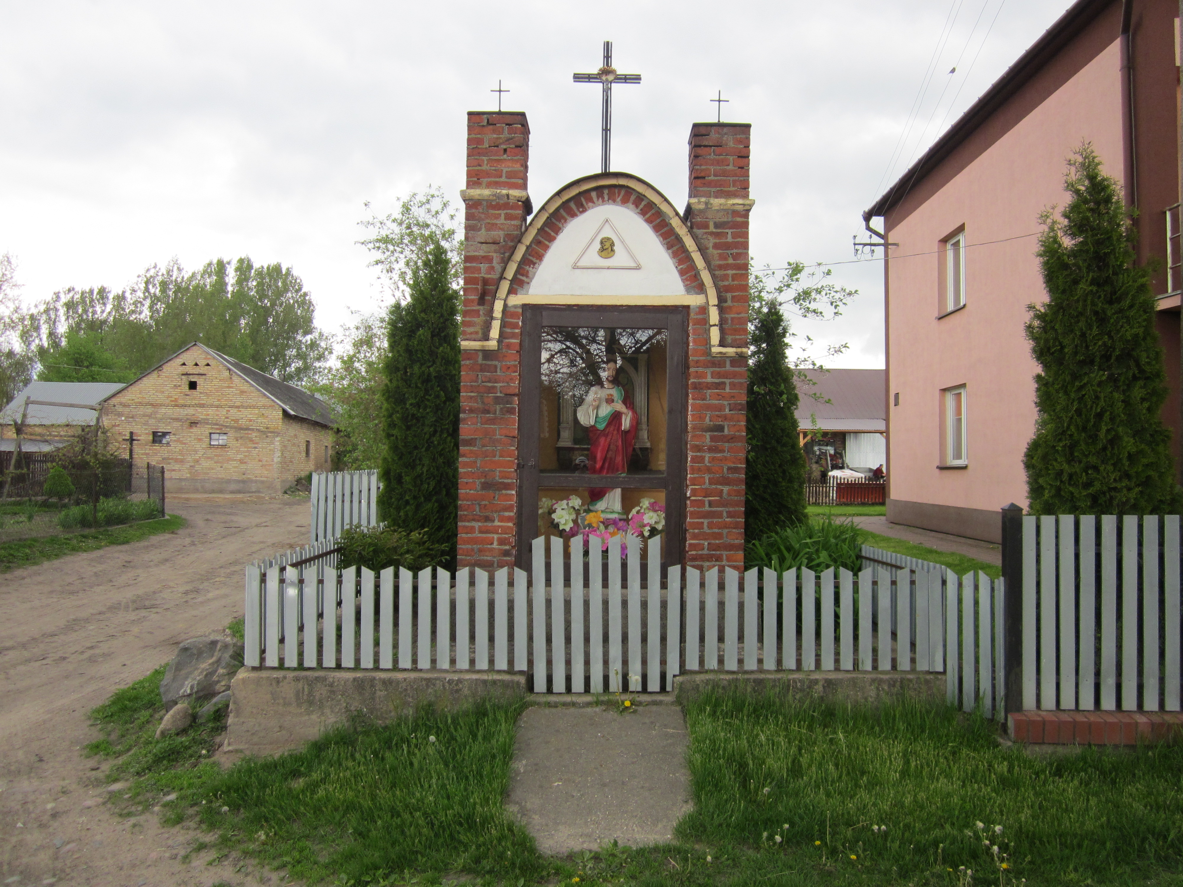 Kapliczka przydrożna z figurą Serca Pana Jezusa.